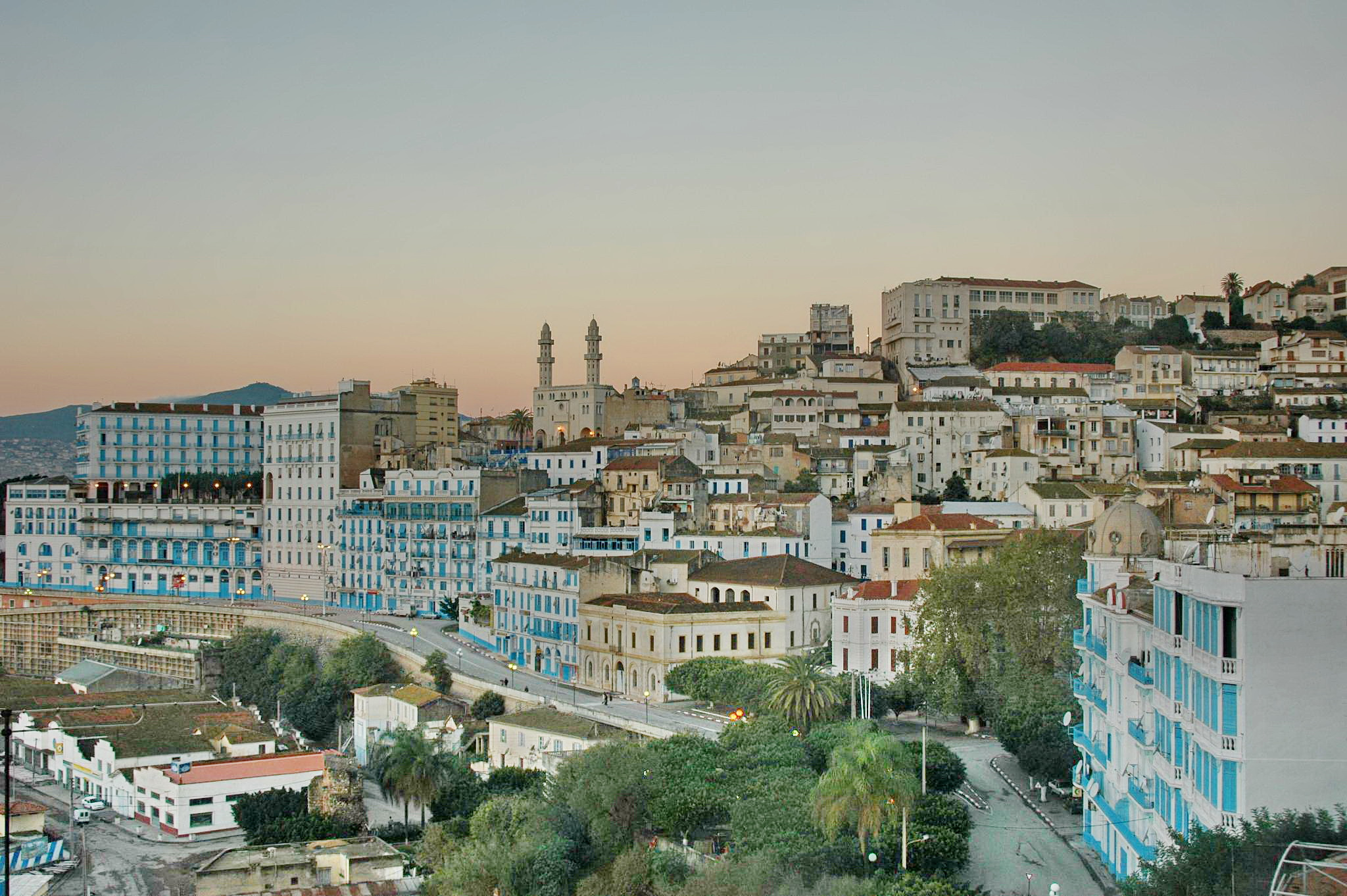 Vue sur Béjaïa (Algérie) du front de mer.